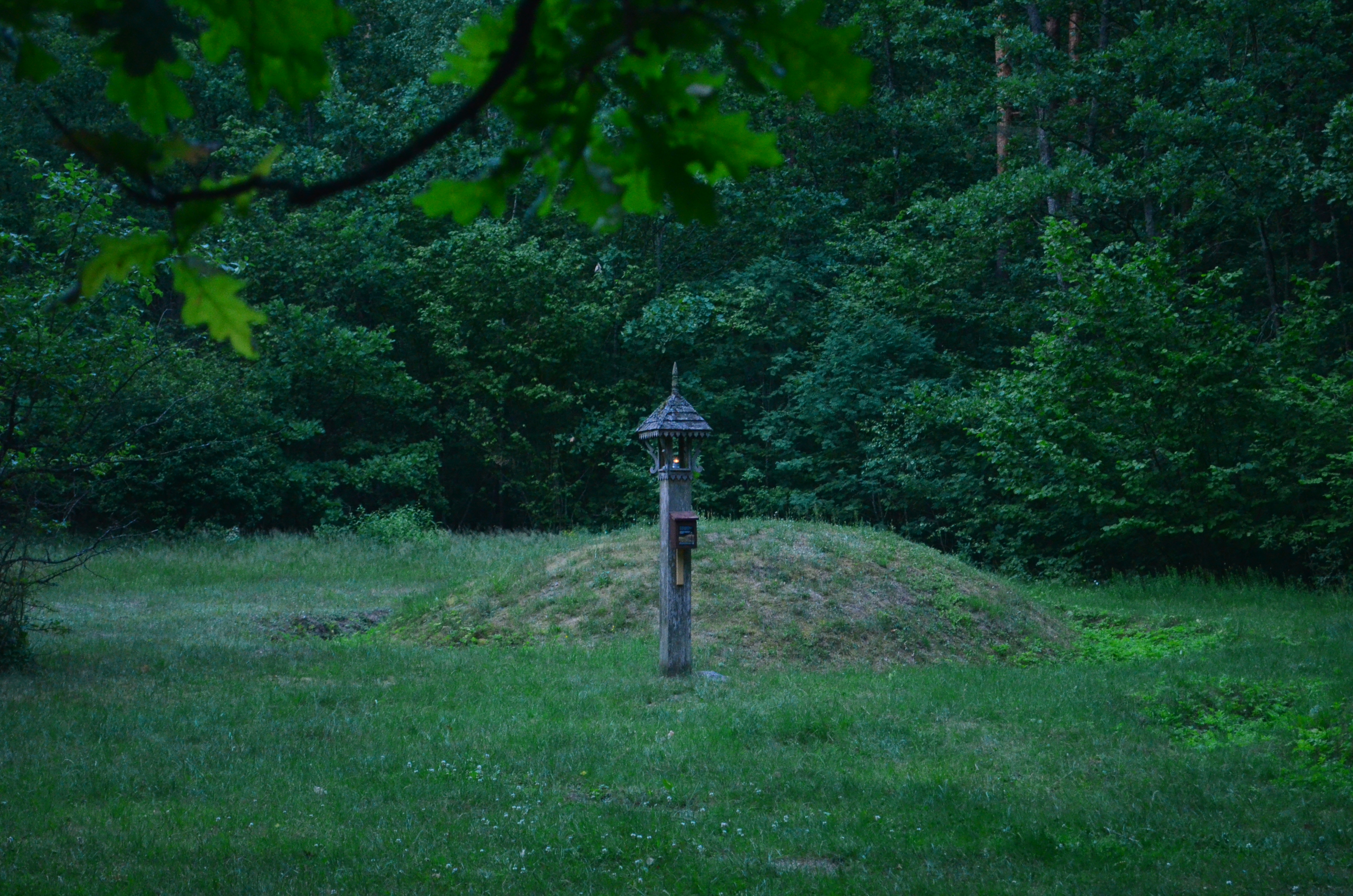 Karmazinų pilkapynas, Vilniaus raj.